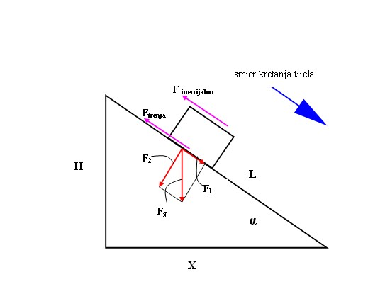 Slučaj gibanja tijela niz kosinu